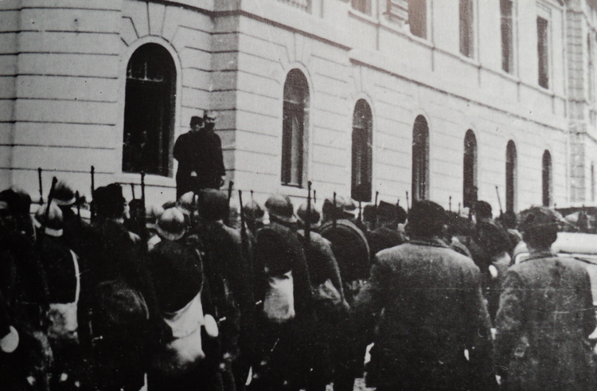 Skup boraca Radničkog bataljona Užiičkog NOP odreda pred odlazak na Kadinjaču, 28. novembra 1941. godine.